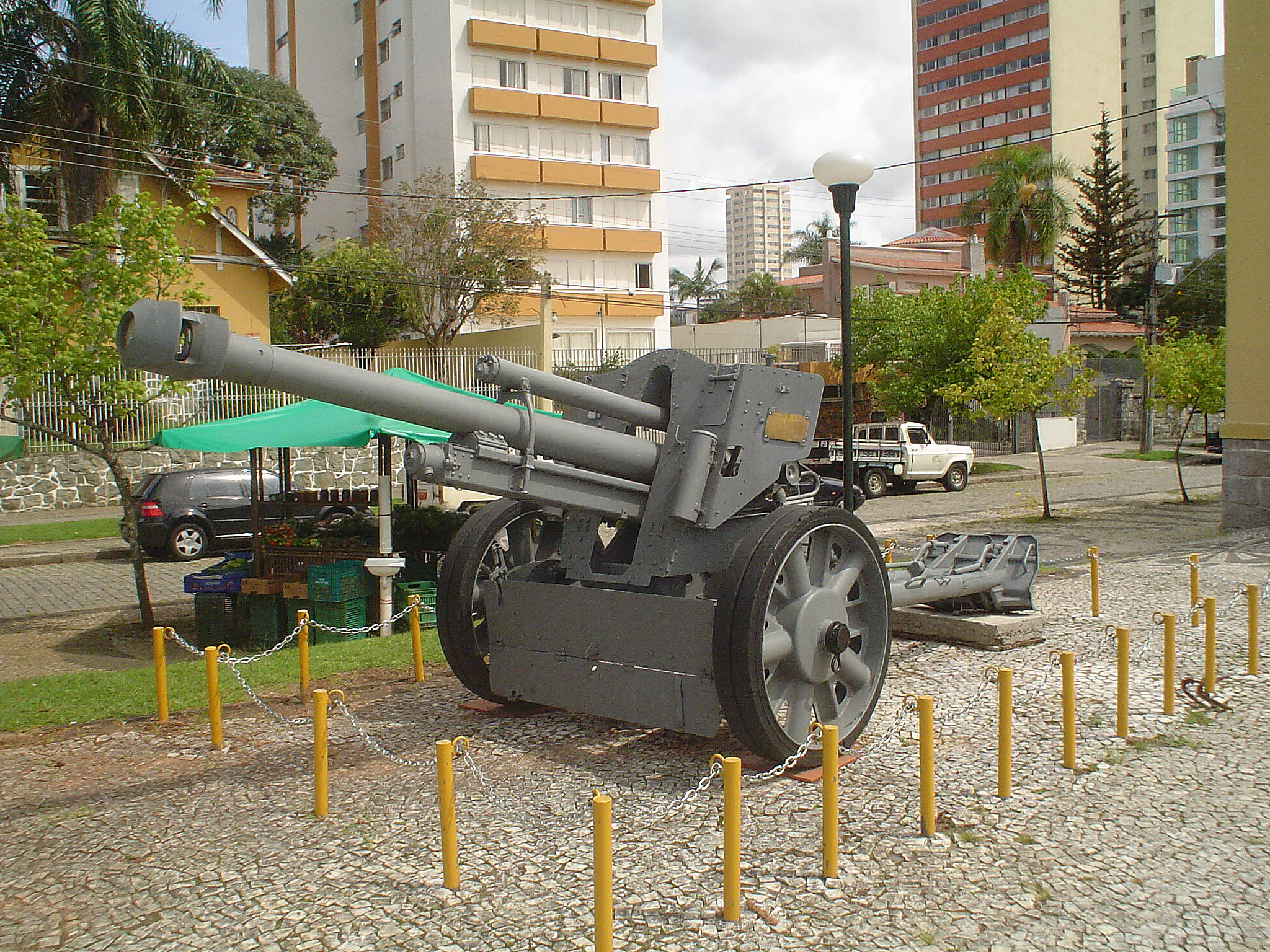 Canhão no pátio do Museu do Expedicionário.